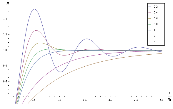 Stegsvar hos bikvadratiskt filter för olika dämpfaktorer.